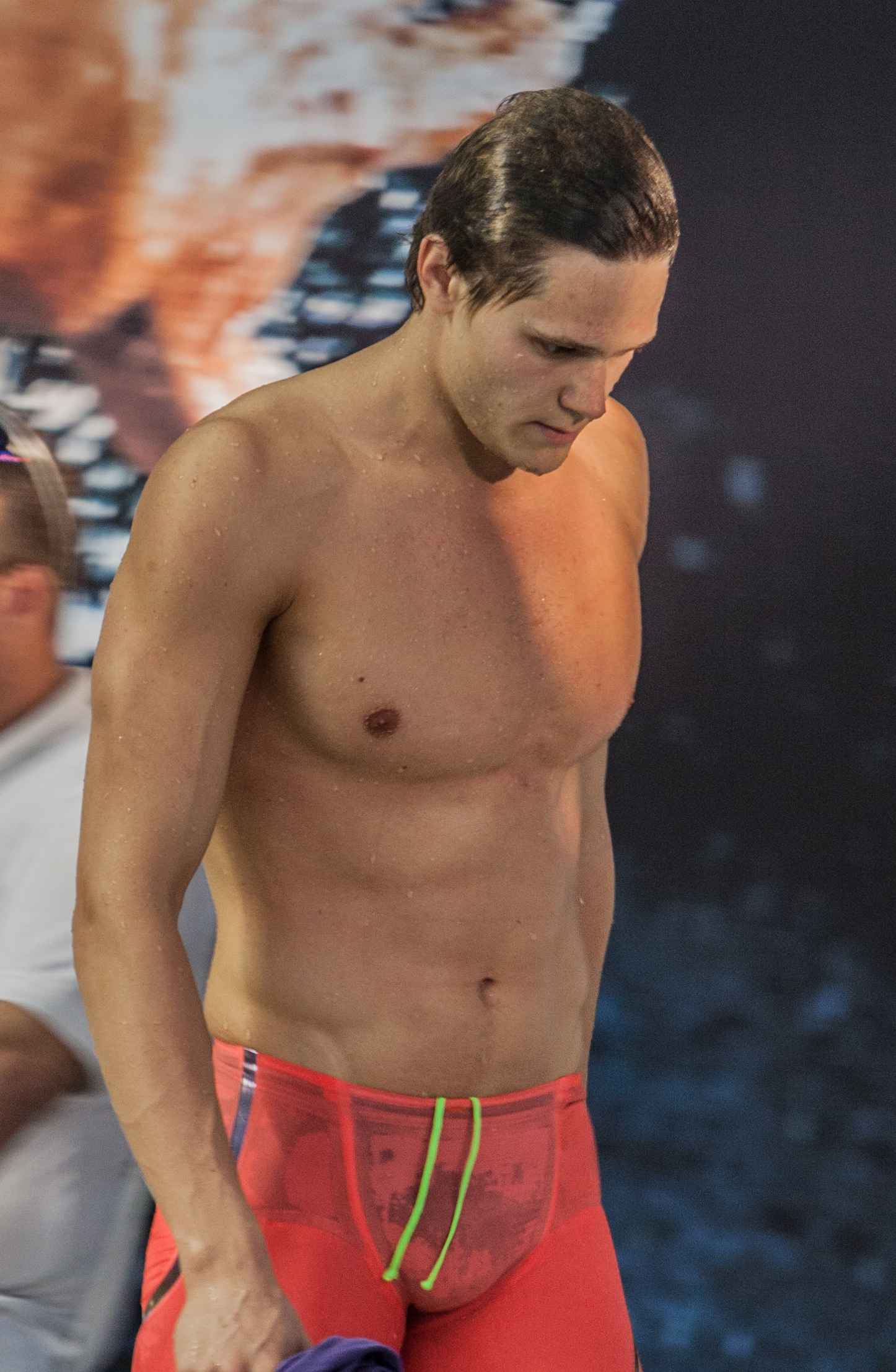 דוד גמבורג, אליפות ישראל בשחייה 2015